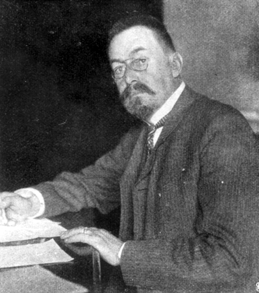 Der deutsche Physiker Carl Georg Walter König (1859-1930)